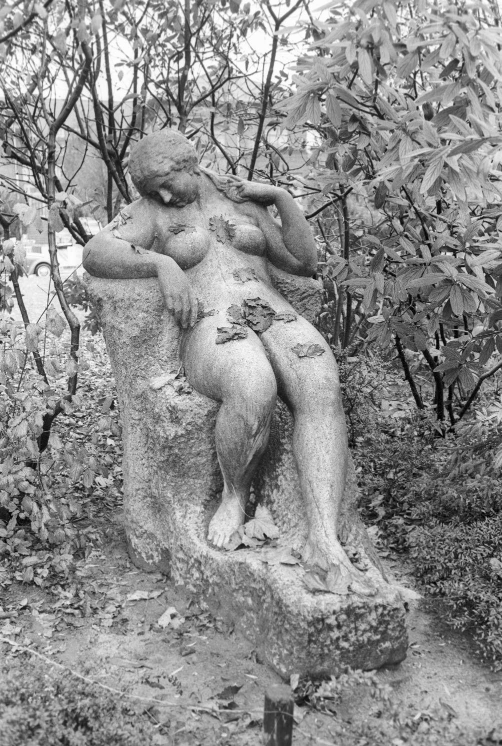 in den Bismarckanlagen (später Hiroshimapark) am Kleinen Kiel, von wo sie 2002 wieder in den Schrevenpark umgesetzt wird, in dem sie bis 1950 stand.